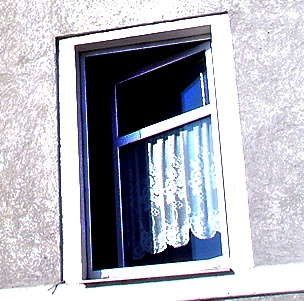 Fenster einer Hamburger Altbauwohnung, zentrales Motiv in dem Film 40 qm Deutschland,. .